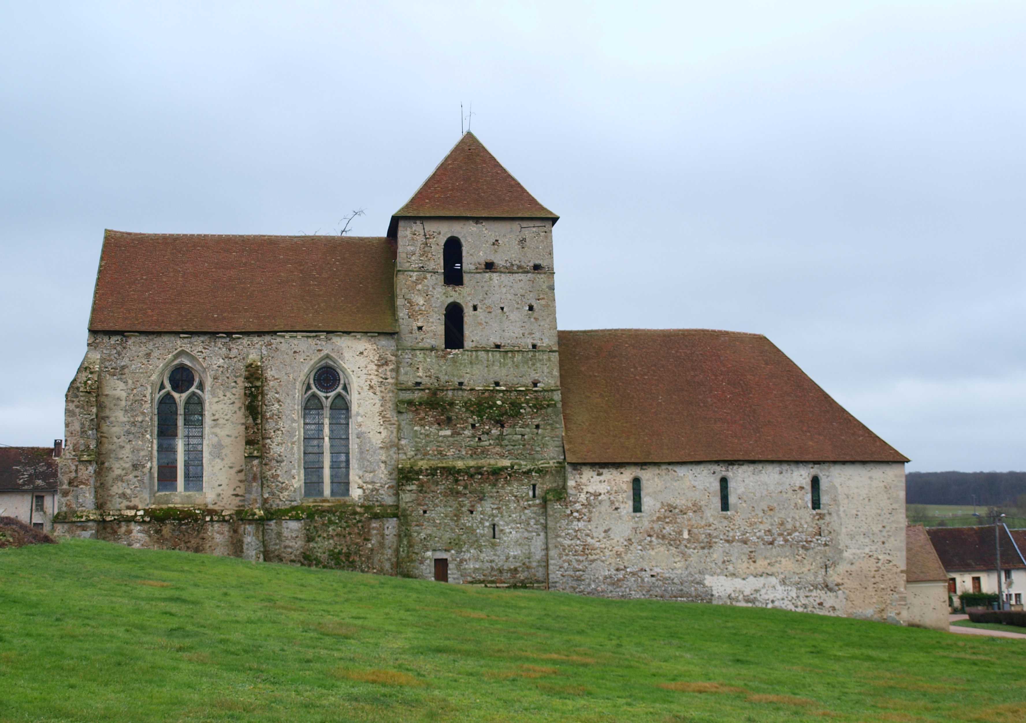 Viffort (Aisne, France) ; Église de la Nativité-de-la-Sainte-Vierge